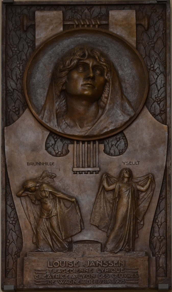 Stèle en bronze et en l'honneur de Louise Jannsen (1863-1938), cantatrice, réalisée en 1932 par Louis Prost (1876-1945)